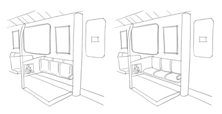 ภาพแสดงเก้าอี้ผู้โดยสารบนรถไฟฟ้าที่สามารถปรับเปลี่ยนการใช้งานได้เป็นที่สำหรับรถเก้าอี้ล้อเลื่อนคนพิการได้